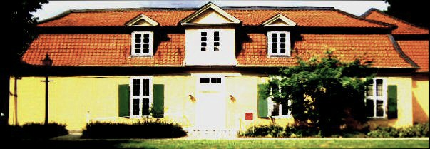 Lessinghaus Wolfenbüttel